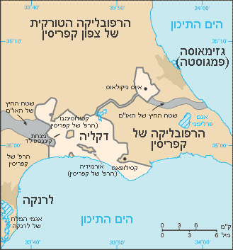 Dhekalja